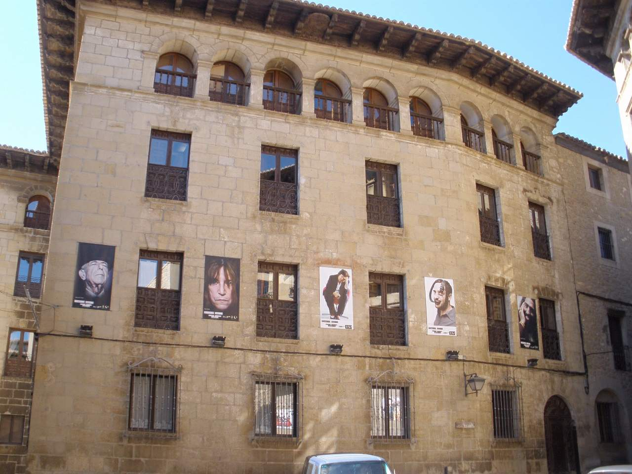 Sos del Rey Catolico - Colegio Isidoro Gil de Jaz